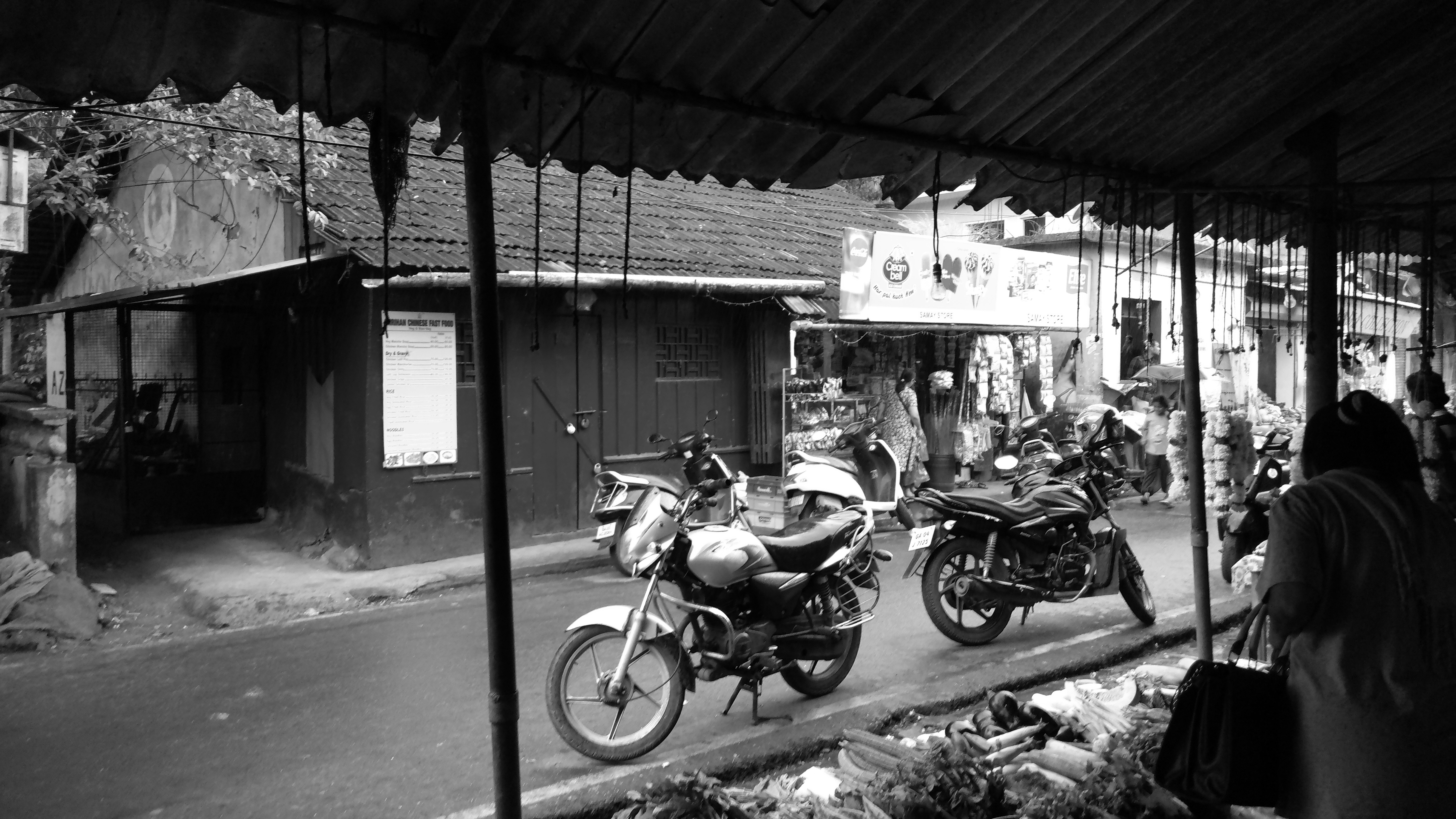 Vegetable market in Goa